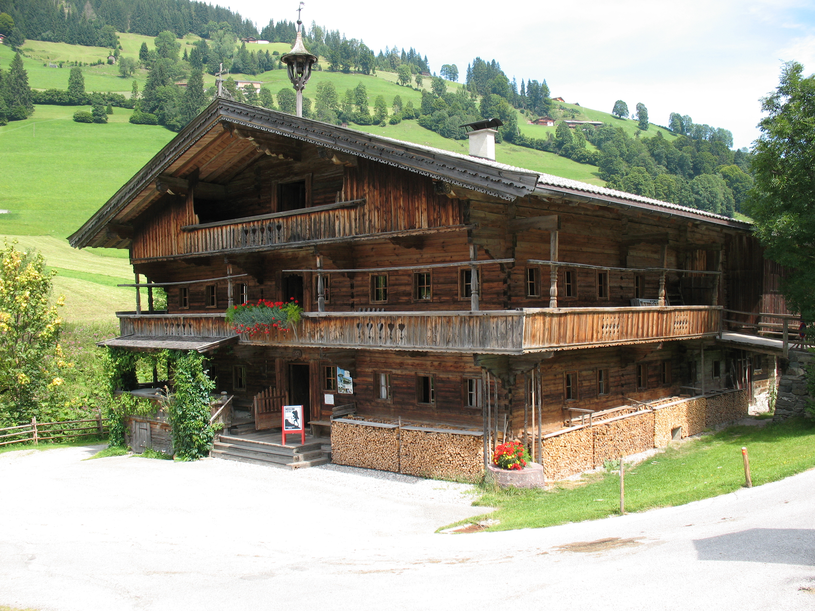 Bauernhaus/ Heimatmuseum Bachhof